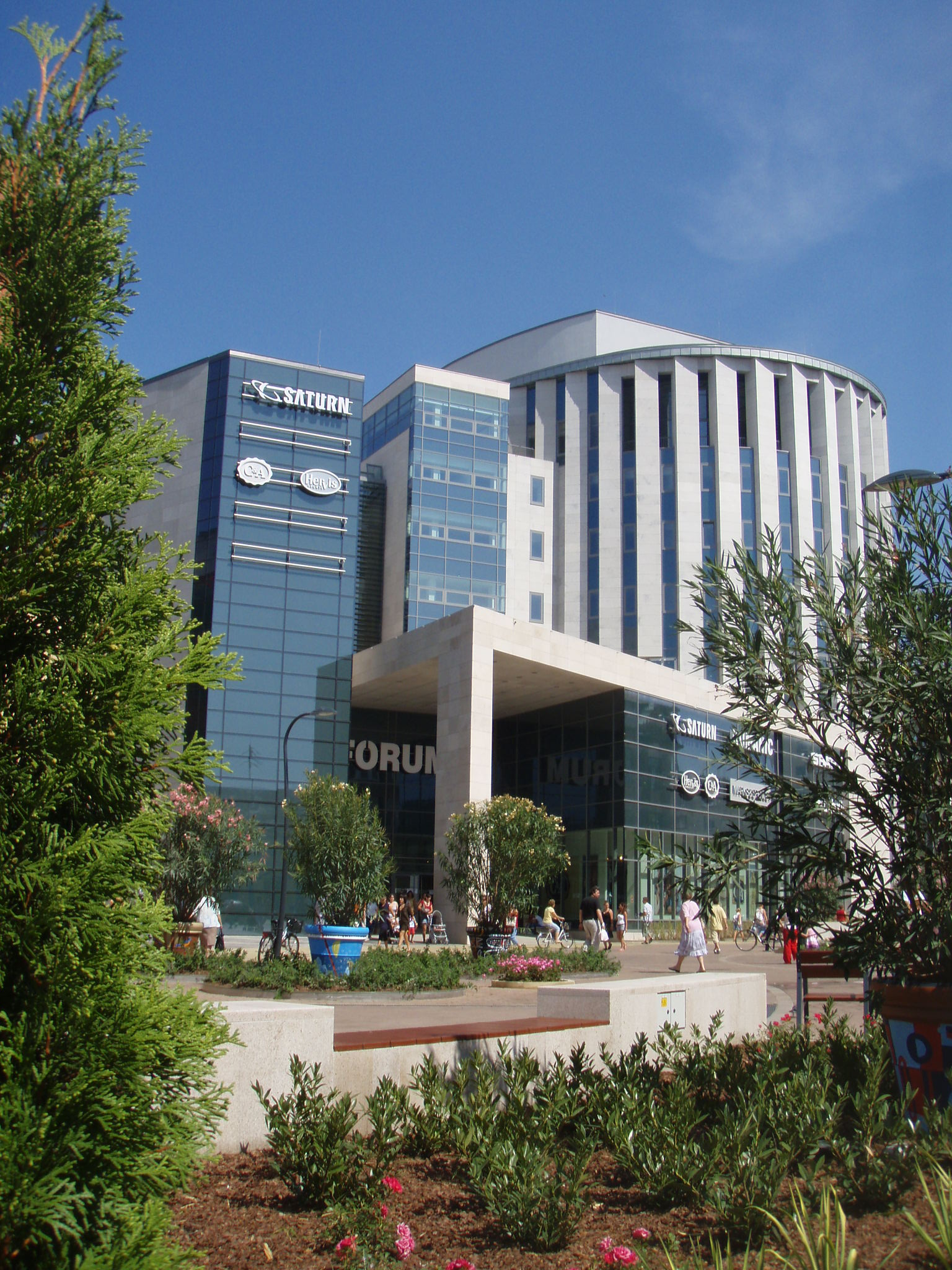 Fórum Debrecen bevásárlóközpont